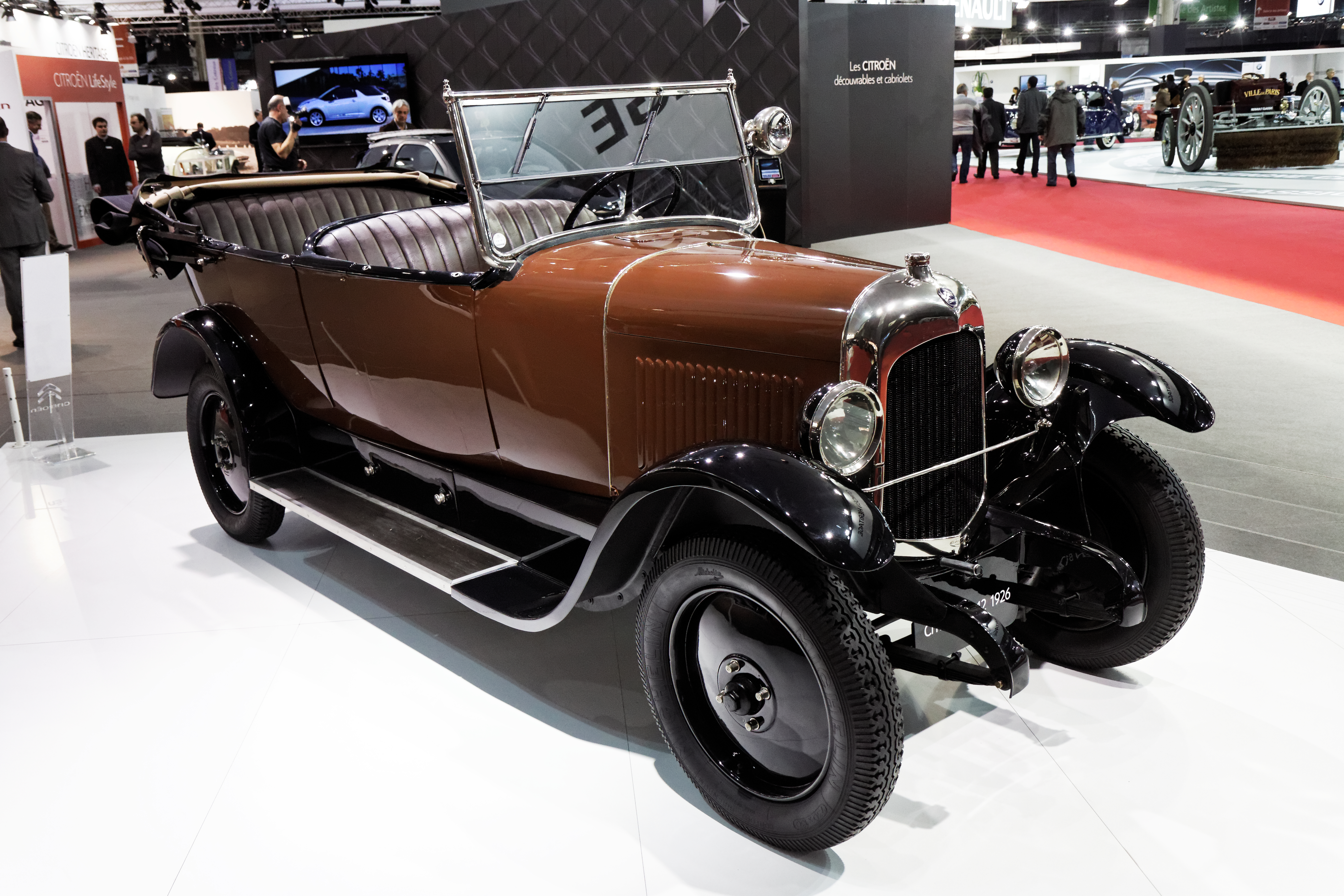 Une Citroën B12 de 1926 exposée lors du salon Retromobile 2013.